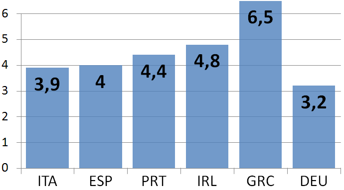 Zinsen 10-jahriger Staatsanleihen der PIIGS-Staaten, Deutschland zum Vergleich. Stand: 18.02.2010 Quelle: Der SPIEGEL 8/2010 S.66